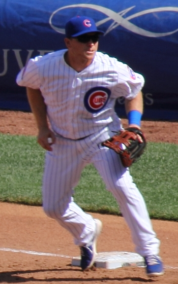 Chris Valaika